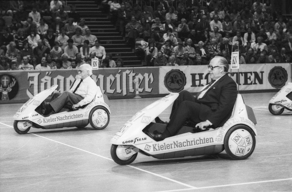 Prominenten-Rallye im Tretmobil. Im Bild Präsident des Landessportverbandes Hans Hansen (vorn) und der Sportchef der Kieler Nachrichten (KN) Siegfried Brandt (hinten links).